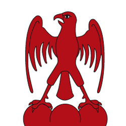 Blason Monfaucon